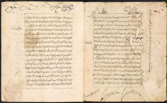 Halaman Depan Hikayat Sang Boma, pindaian oleh British Library